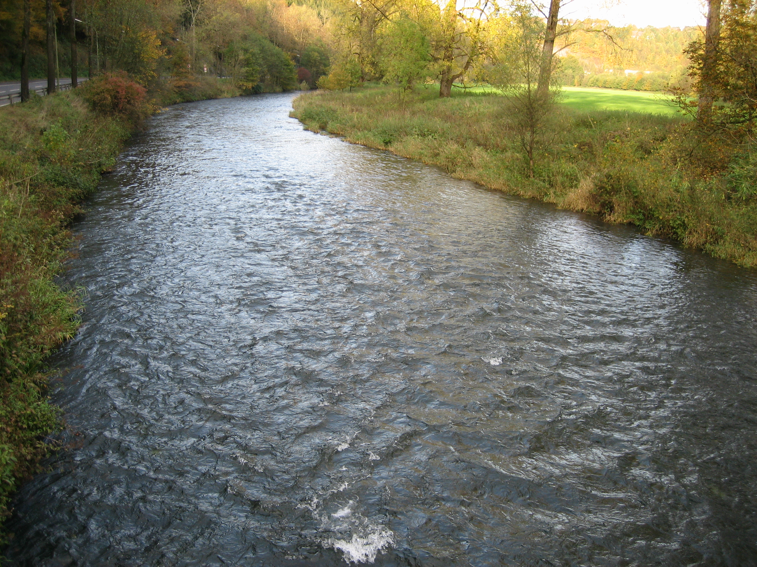 Bigge Fluss, kurz vor der Mündung in die Lenne